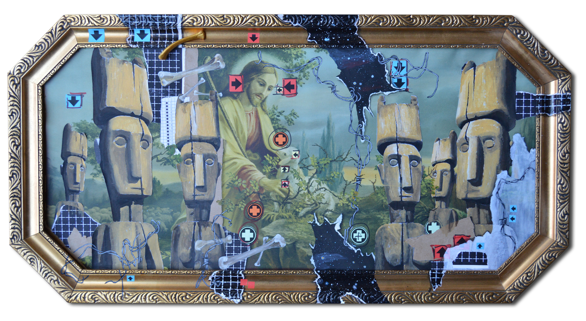 Der Gute Hirte, 2015, Mischtechnik (Collage und Acrylmalerei) auf gerahmtem Kunstdruck des frühen 20. Jahrhunderts